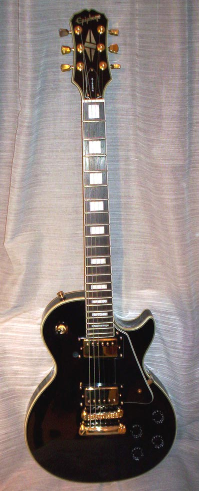 Epiphone Les Paul custom (personal picture)